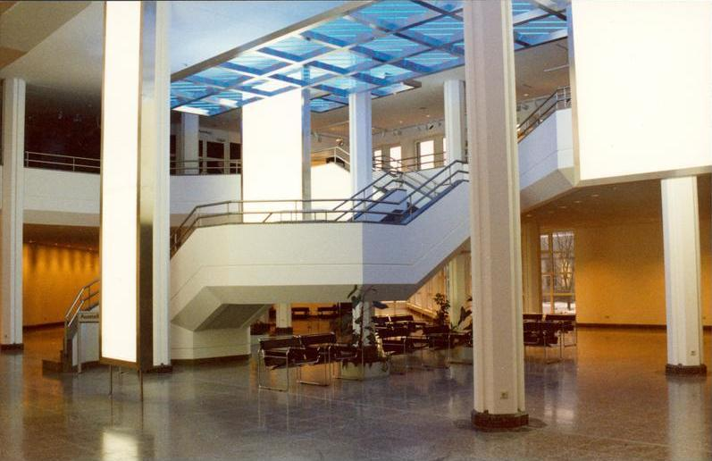 Bundesarchiv in Koblenz Foyer Aufnahme: 1998